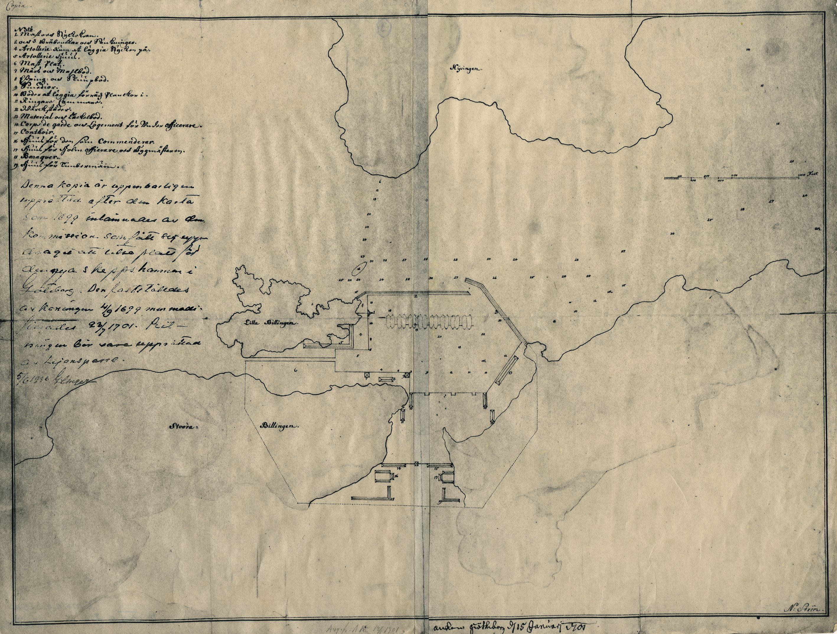 Design av örlogshamnen Nya Varvet i Göteborg